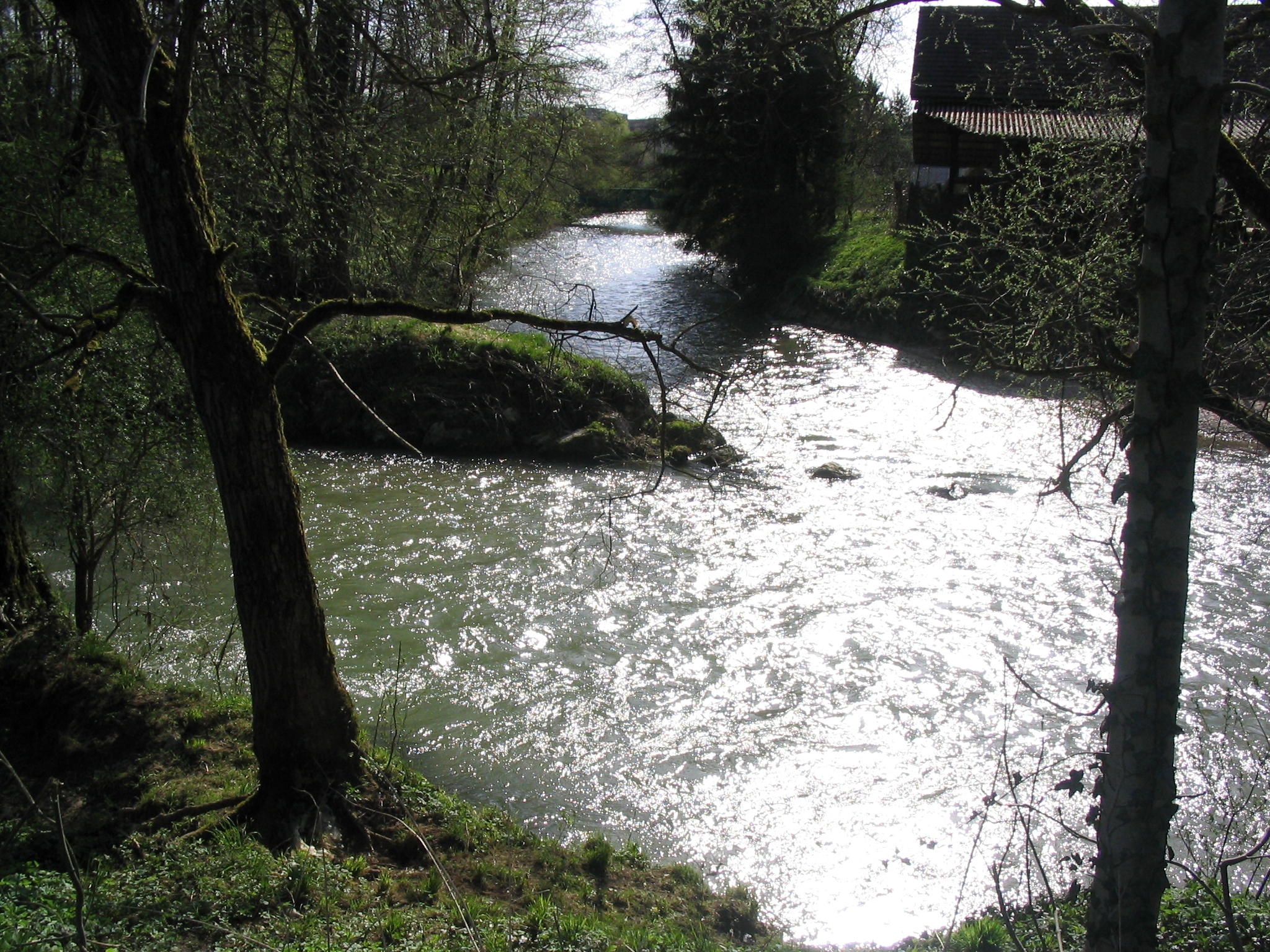 Photo du confluent de la Birse et de la Sorne à Delémont (CH) : à gauche la Birse, en dessus son affluent la Sorne. Cette photo à été prise le 23 mars 2006 par Cédric Trachsel